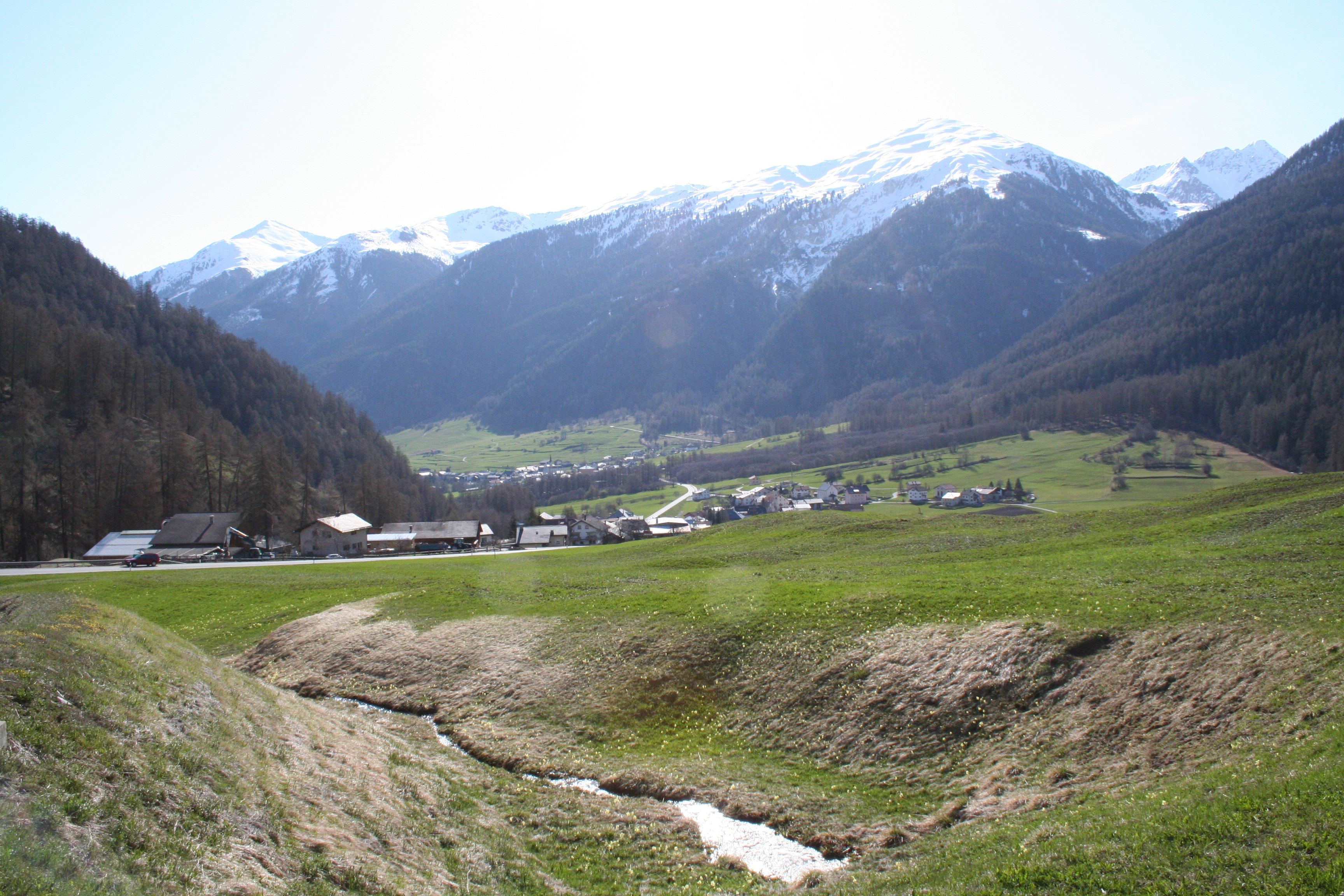 Das Münstertal Richtung Osten bei Valchava